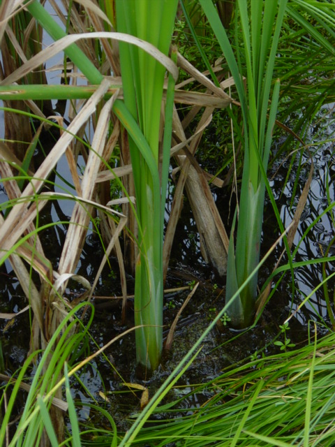 Schilf